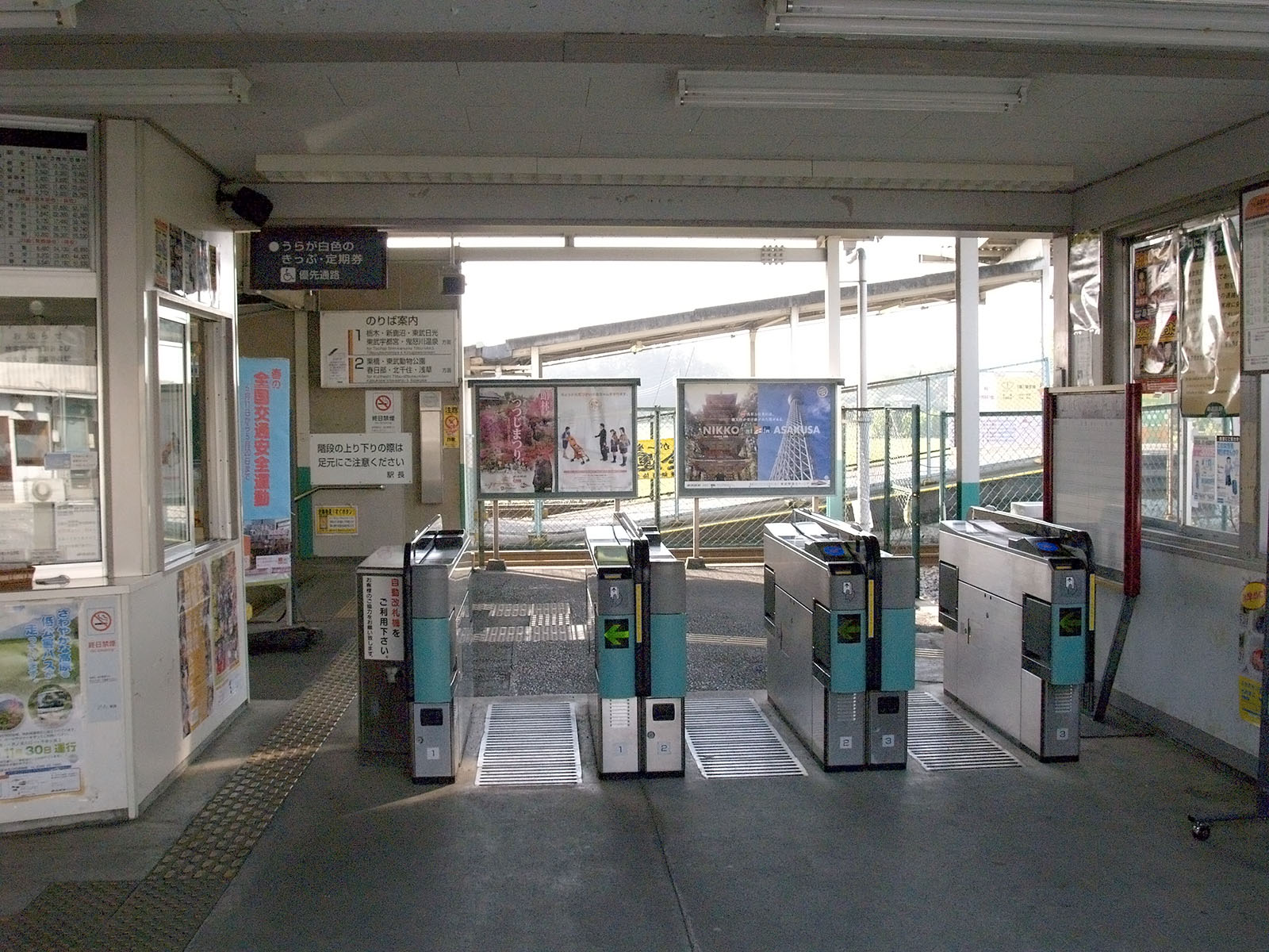 静和駅改札口